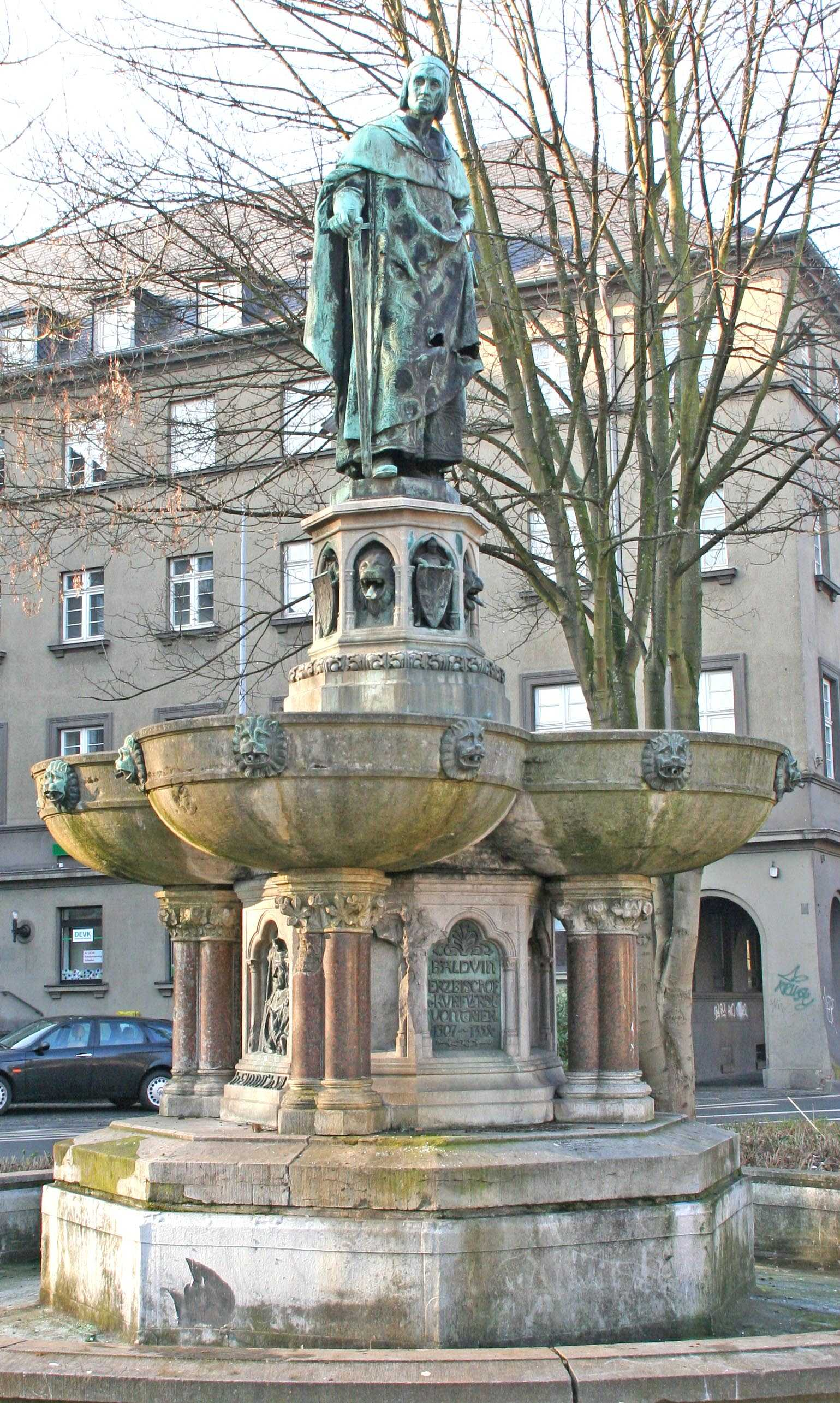 Balduin Sprangbur TR. Lizenz:GFDL (Mat Nennung vum Numm vun Fotograf, soss soll de Blëtz deen, deen dat bergësst, um Schäisshaus grillen)